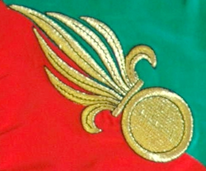 Grenade de la Légion sur fond rouge et vert